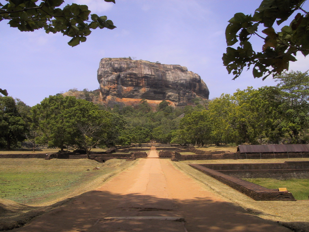 Rocher de Sigiriya Contents 1 Source 2 Statut 3 Licensing 4 Original upload log Source Photo prise par Cécile Sprimont. juillet 2003 Statut catégorie:Histoire du Sri Lanka